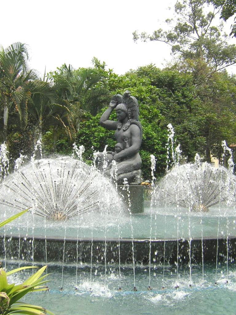 La Bachué de José Horacio Betancur, hace parte de la fuente ubicada al frente del Teatro Pablo Tobón Uribe. Medellín, Colombia